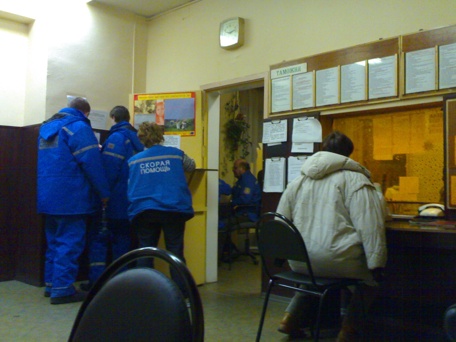 52 п\ст диспетчерская